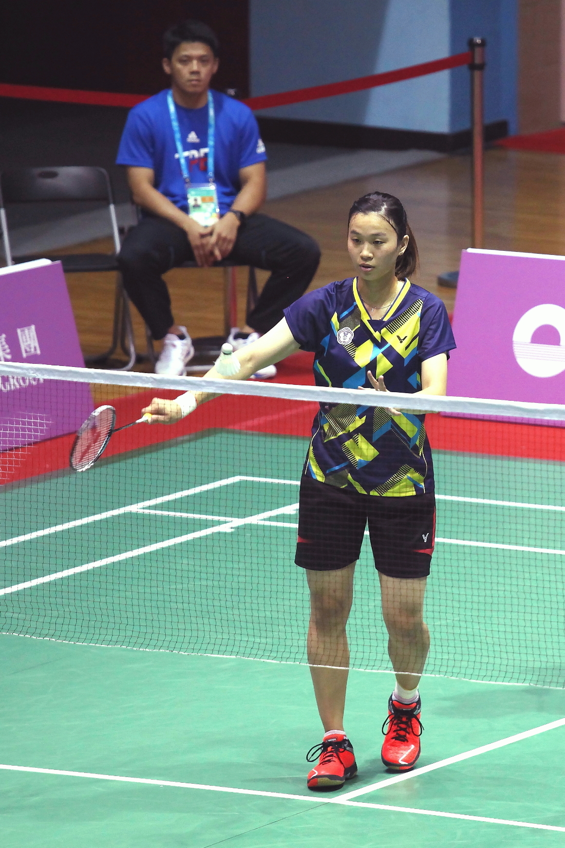 2017 臺北世大運混團女雙 許雅晴 01